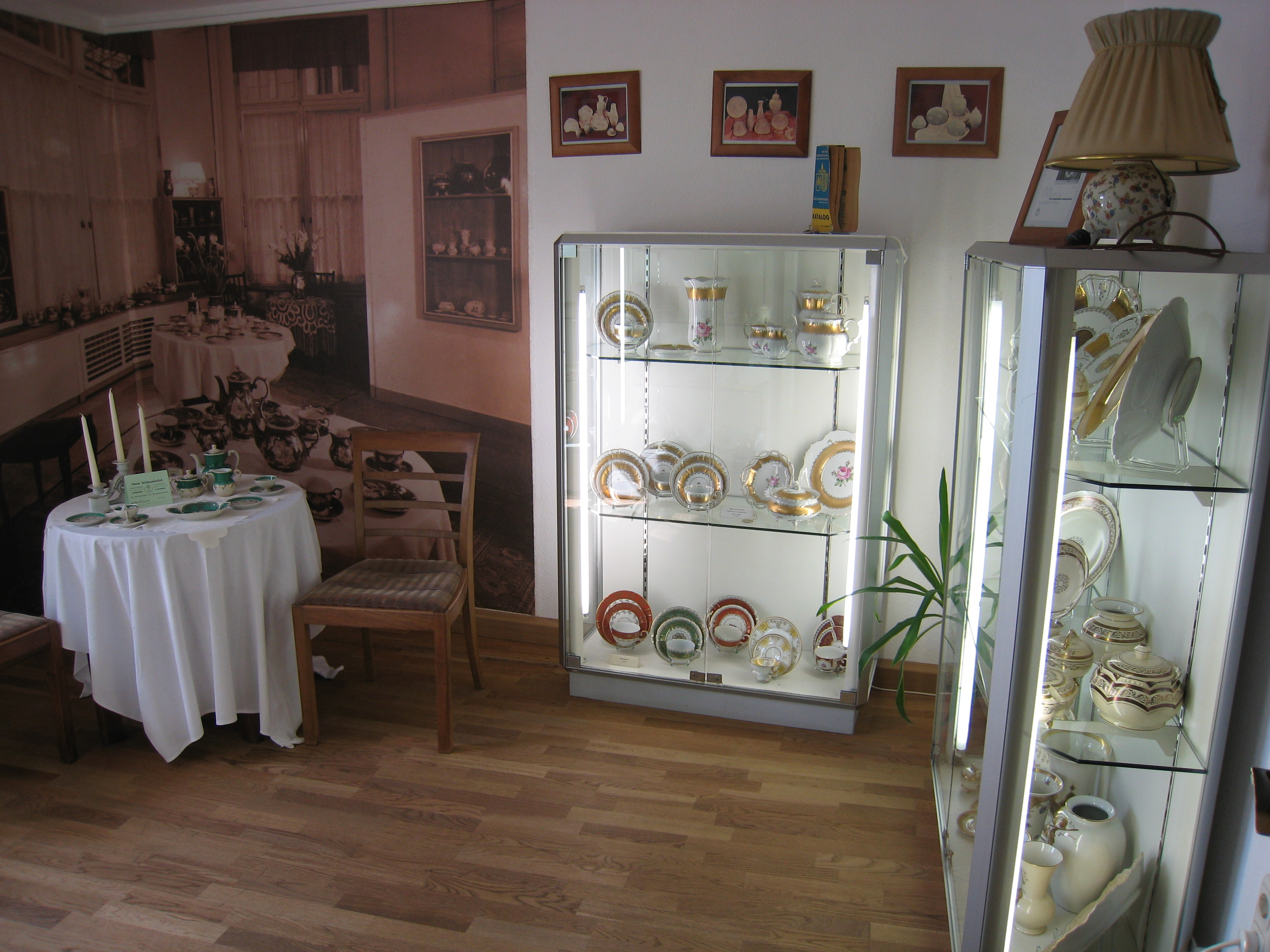 Porzellanausstellung im Heinsehaus in Langewiesen.